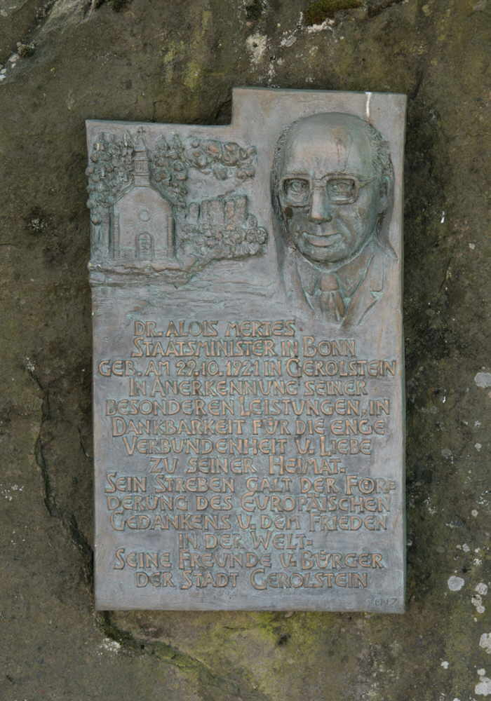 Gedenktafel für Alois Mertes in seiner Geburtsstadt Gerolstein in der Eifel